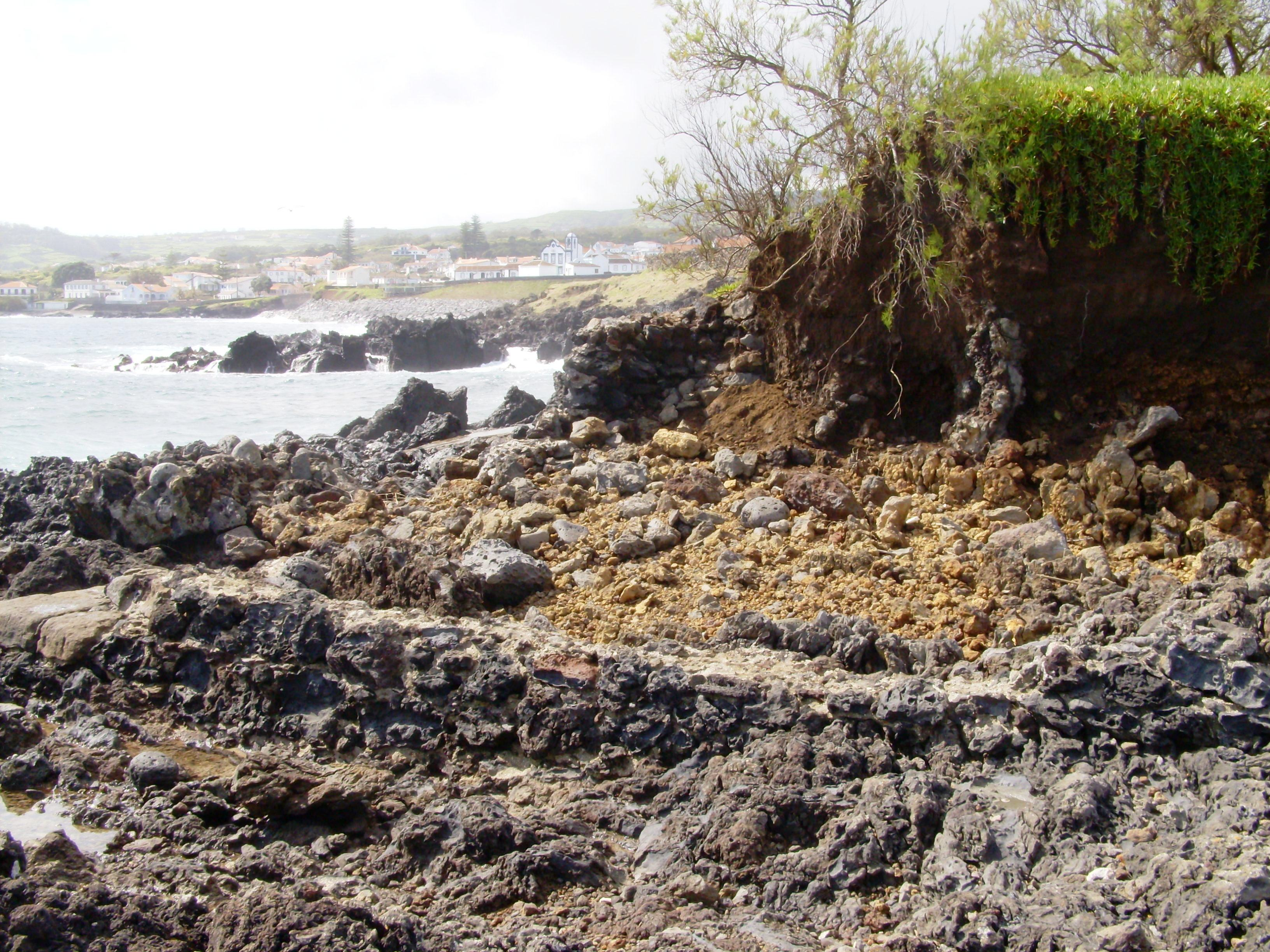 Forte de São Bento, Porto Martins, Praia da Vitória, Ilha Terceira, Açores: remanescentes.